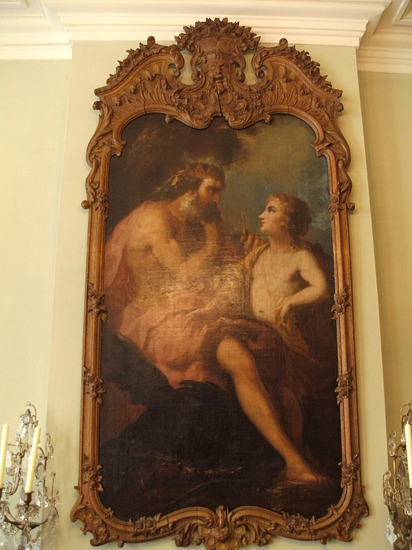 Bilder aus dem Couven-Museum - Gemälde